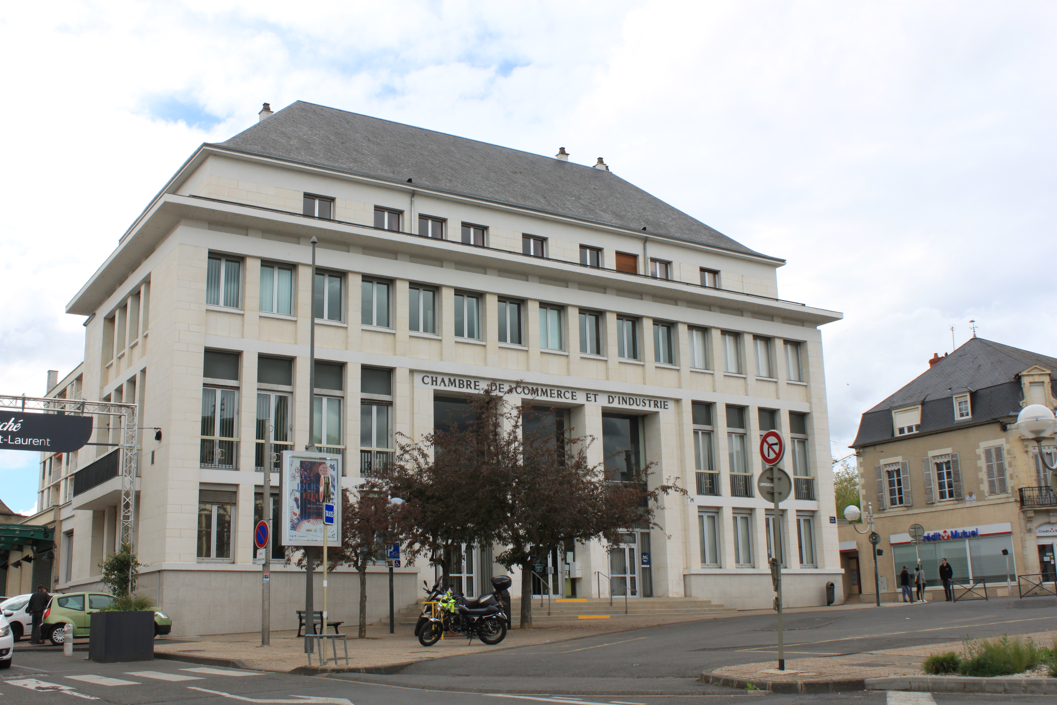 Nevers, Nièvre, Bourgogne, France